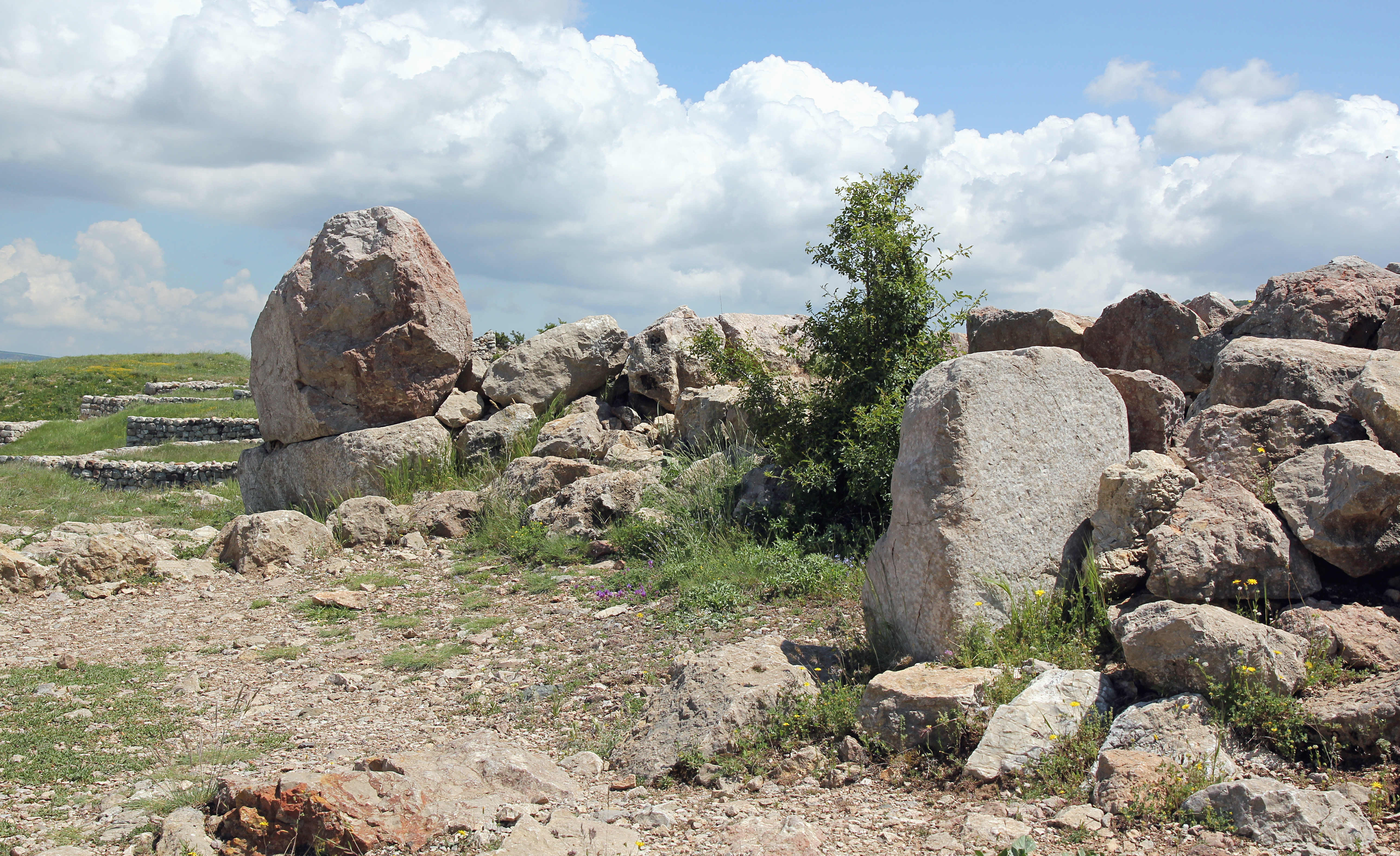 Büyükkale, die Zitadelle der hethitischen Hauptstadt Hattuša bei Boğazkale, Zentraltürkei, Südtor